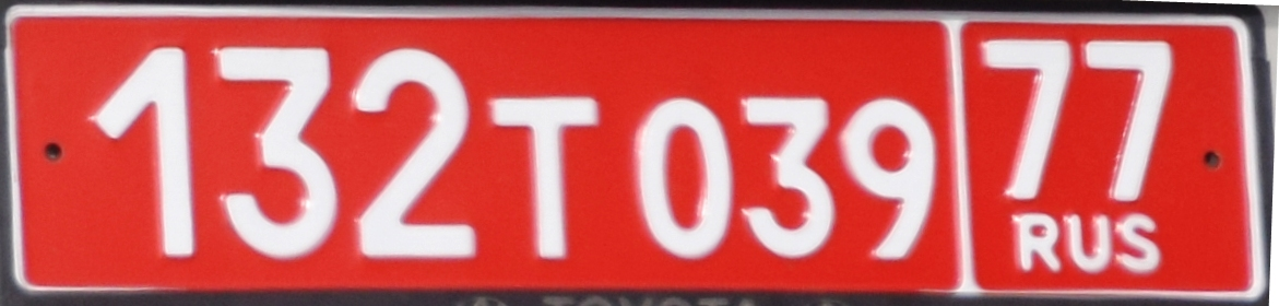 T - de kentekenplaat is afgegeven aan de auto van een werknemer van een diplomatieke missie, consulair bureau, een internationale organisatie die geen diplomatieke status heeft (administratief en technisch personeel)